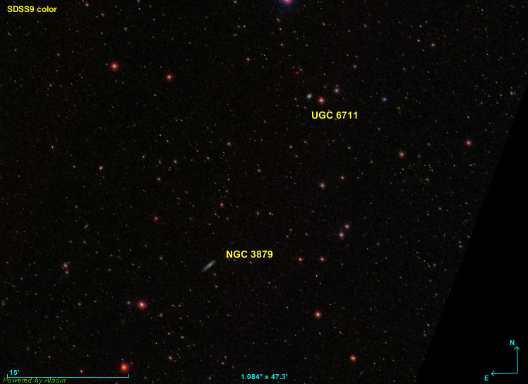 Réalisée avec Aladin et les données SDSS